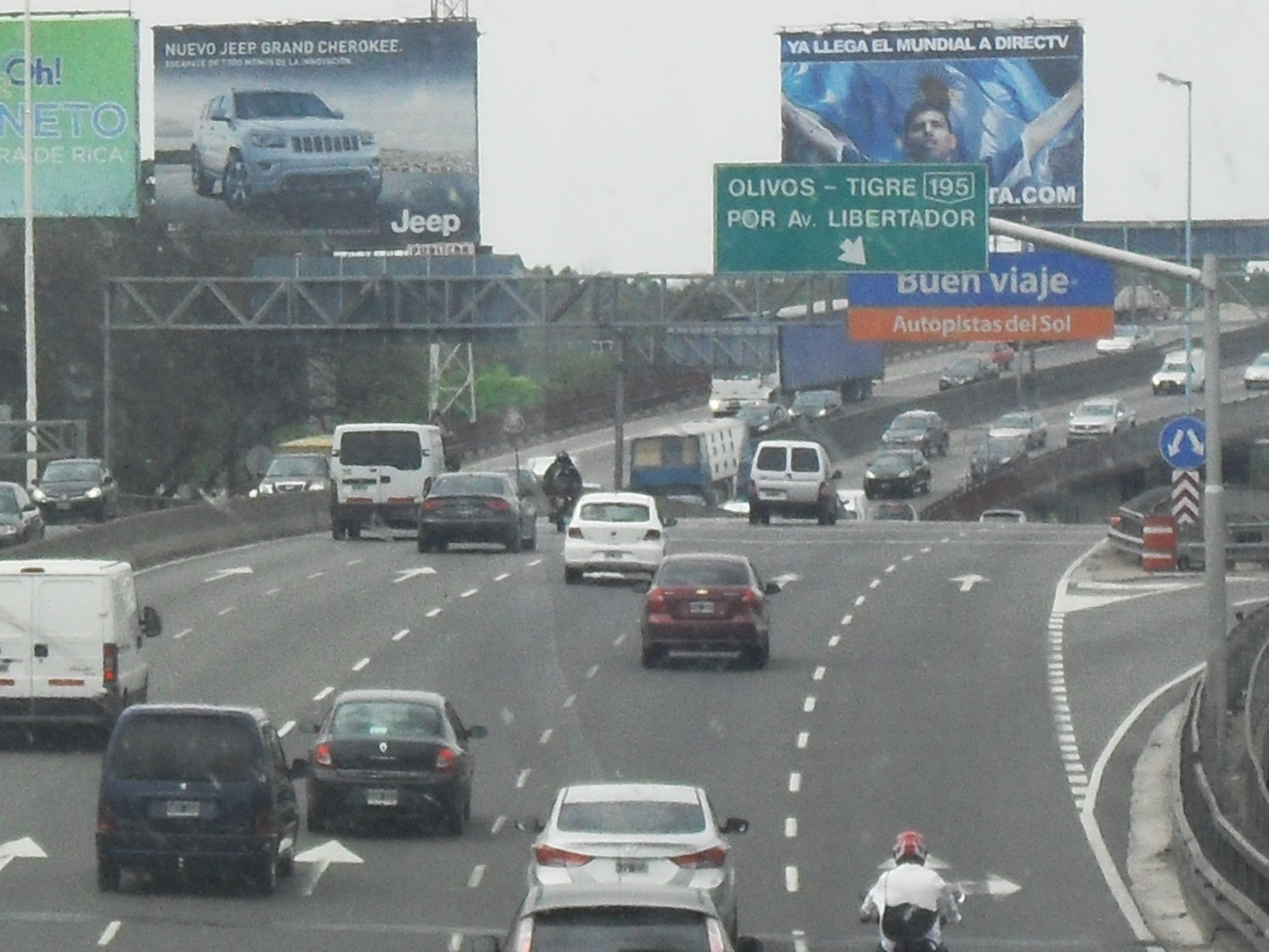 Finalización de la avenida General Paz, con bajada directa a avenida Lugones.